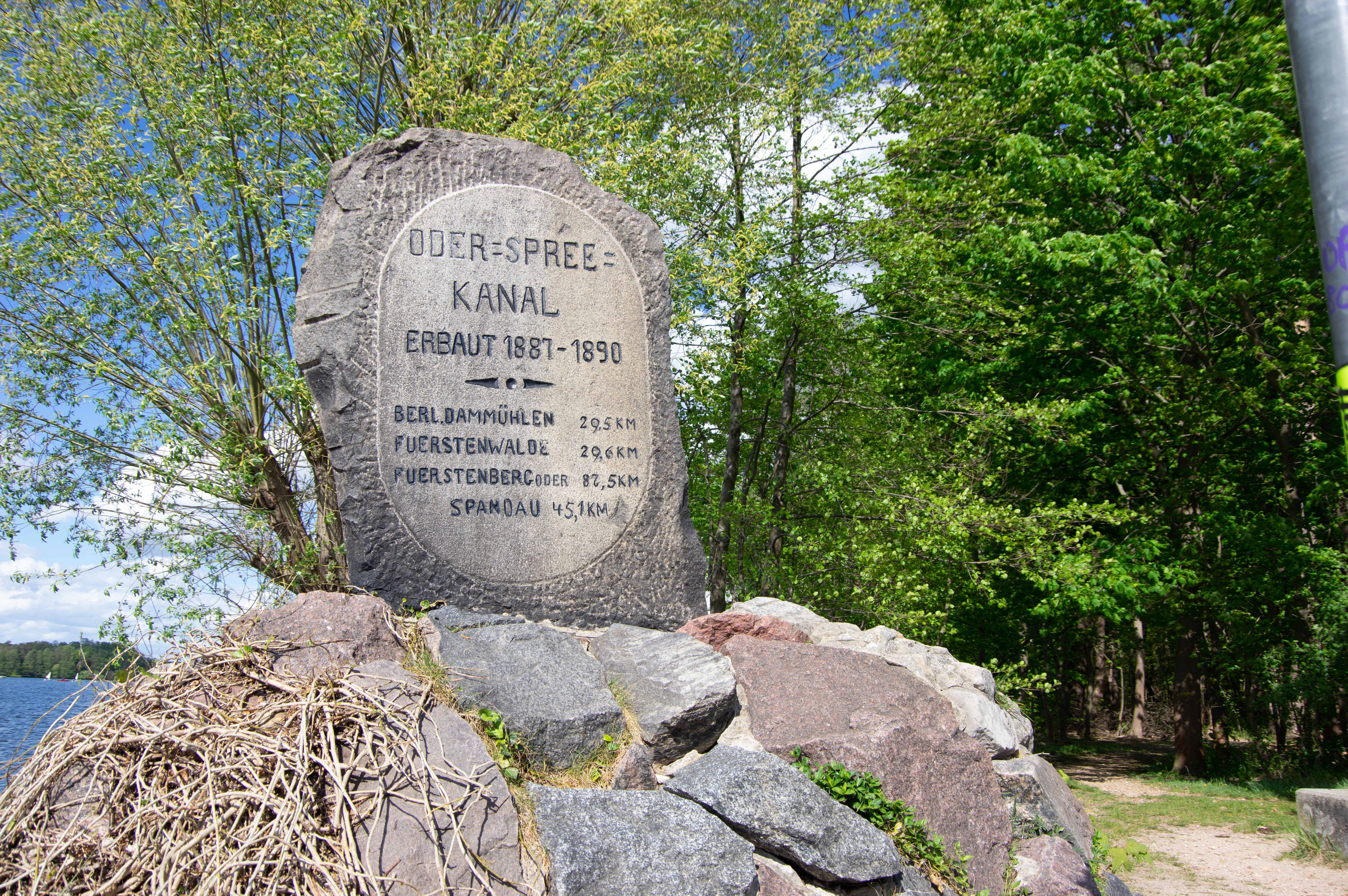 er Oder-Spree-Kanal verbindet den Seddiner See, damit die Spree, mit der Oder. An der Einfahrt zum Kanal vom Seddiner See aus steht dieses Denkmal, welches an den Bau des Kanals erinnert.